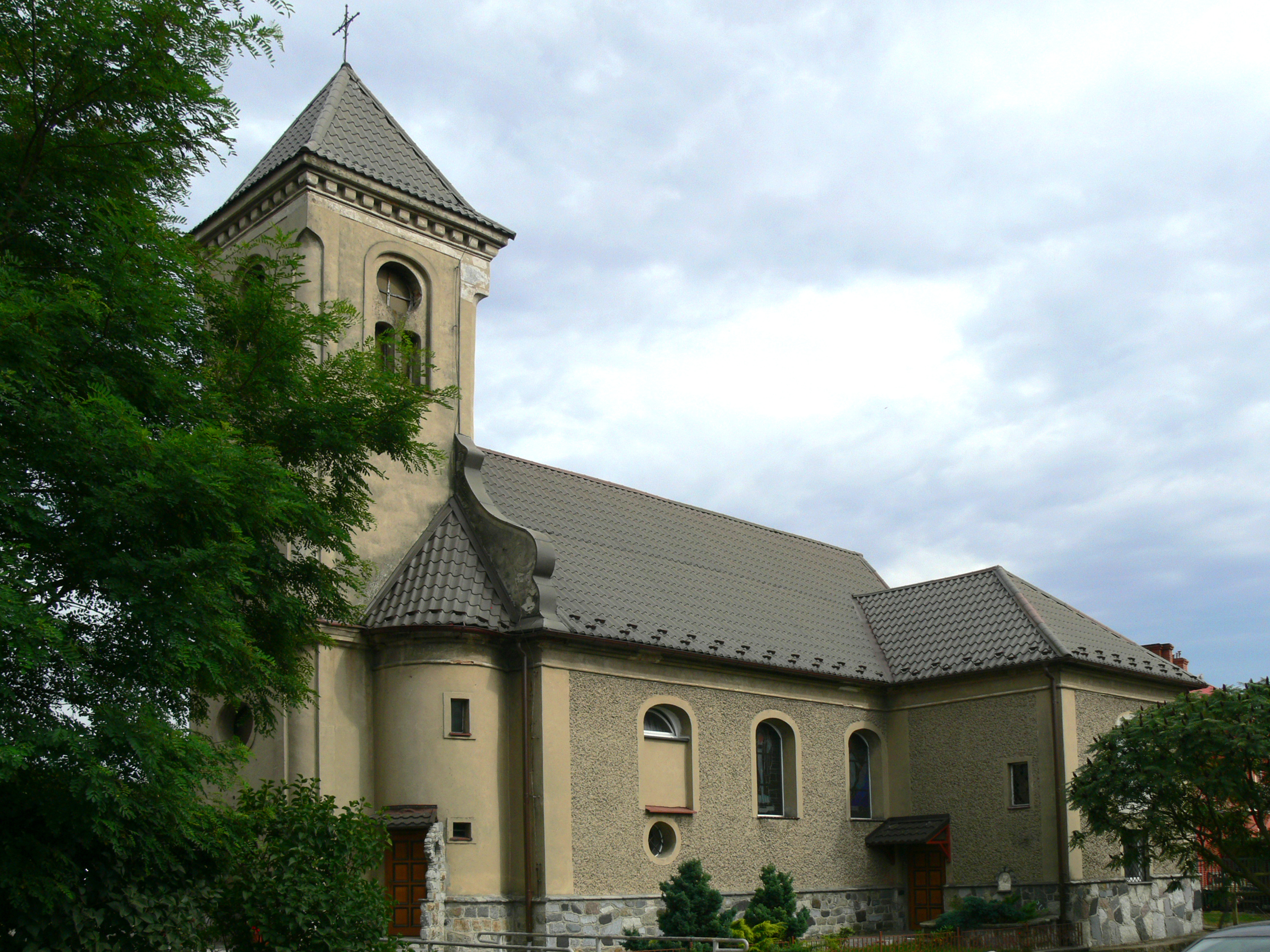 Kubice, kościół fil. p.w. Wniebowzięcia NMP, 1806, kon. XIX